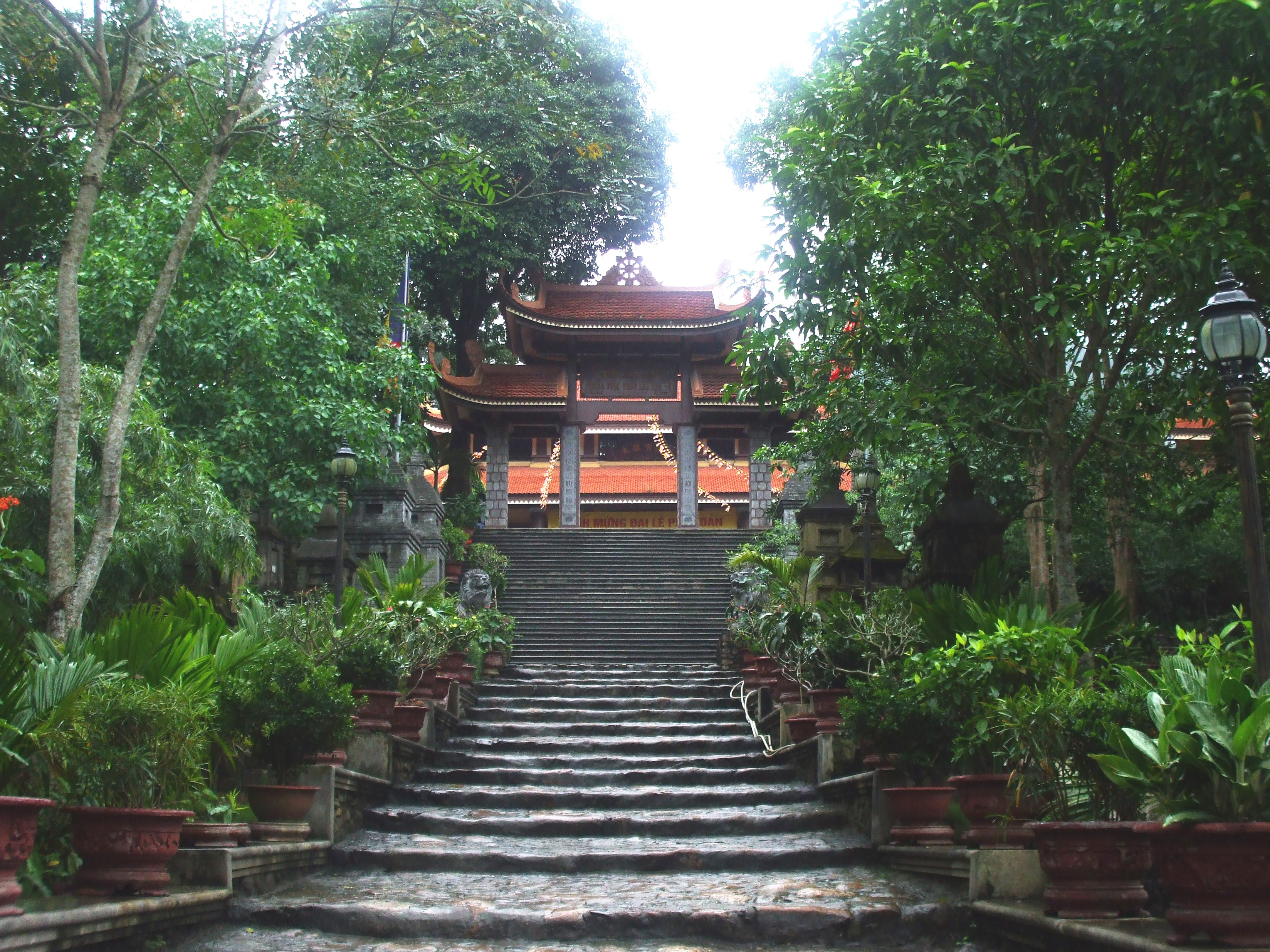 Tam quan Thiền viện Trúc Lâm Yên Tử, còn gọi là Chùa Lân (Uông Bí, Quảng Ninh, Việt Nam).